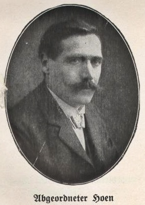 Franz Xaver Hoën (1864-1935), Deutscher Reichstags- und elsass-lothringischer Landtgsabgeordneter (Zentrum)